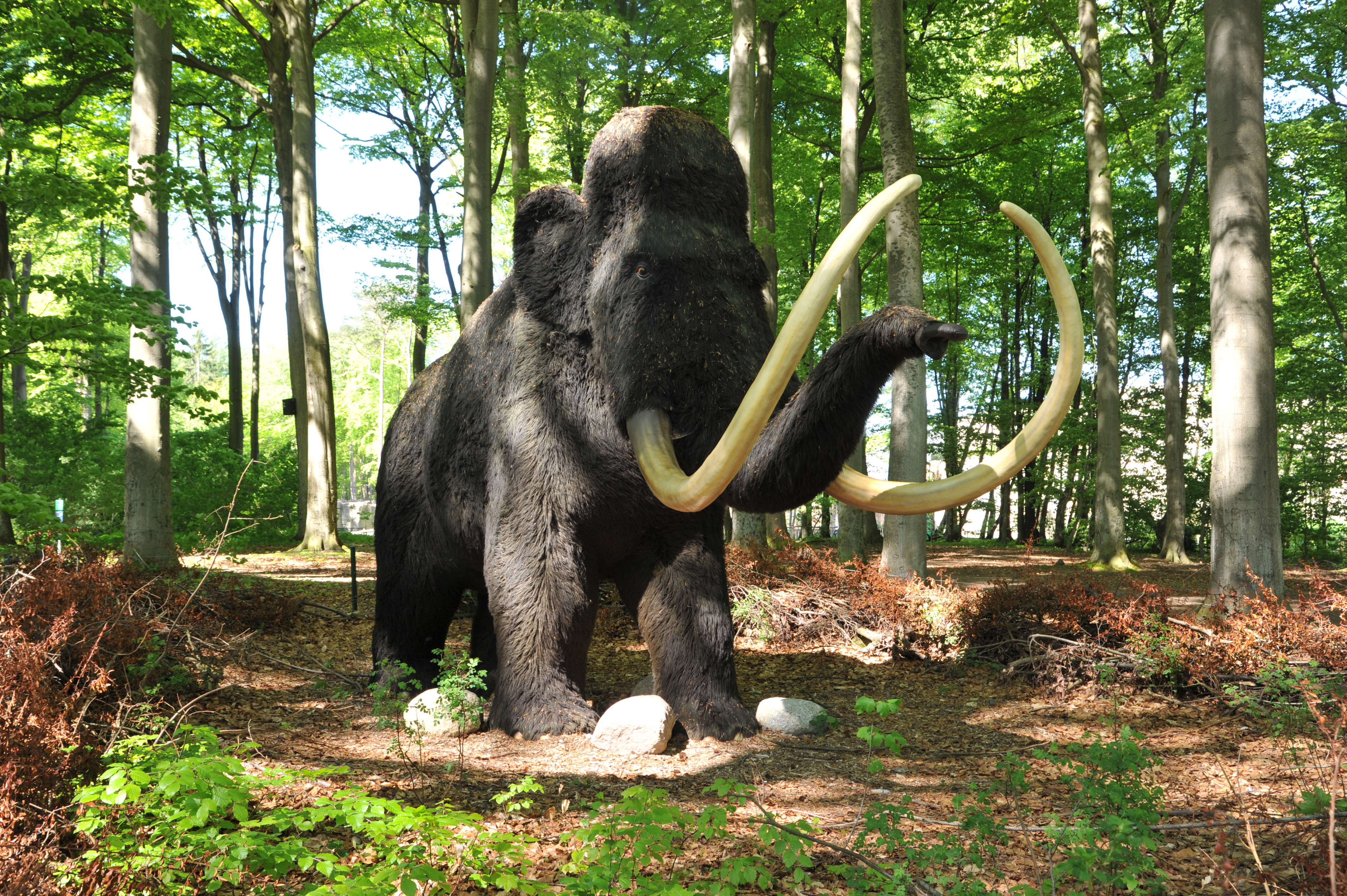 Mammut